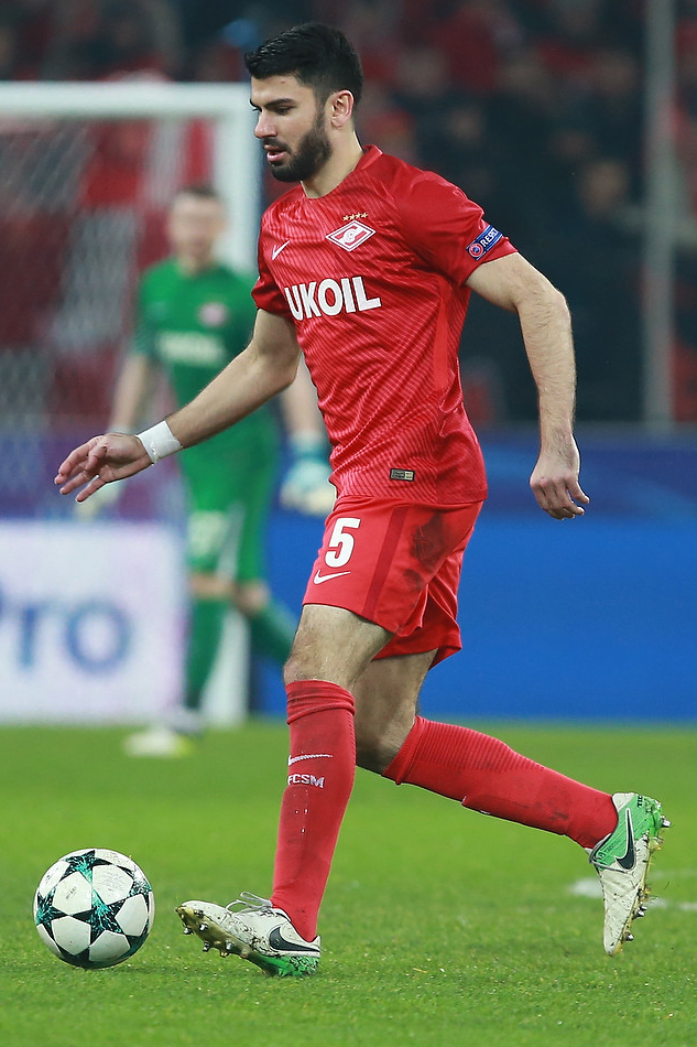 «Спартак» остается в еврокубках